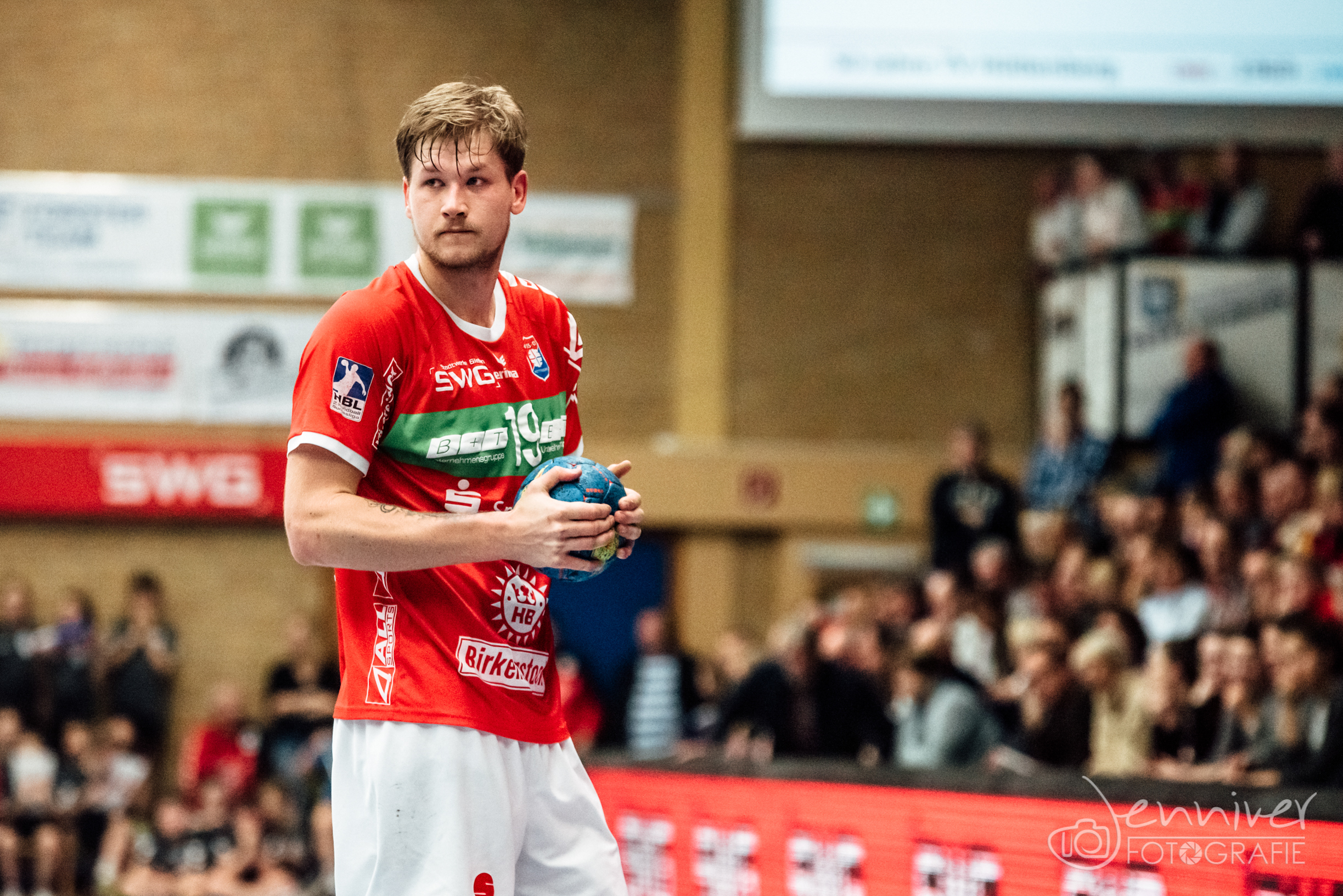 Markus Stegefelt im Fokus vor heimischer Kulisse im Sportzentrum Hüttenberg.